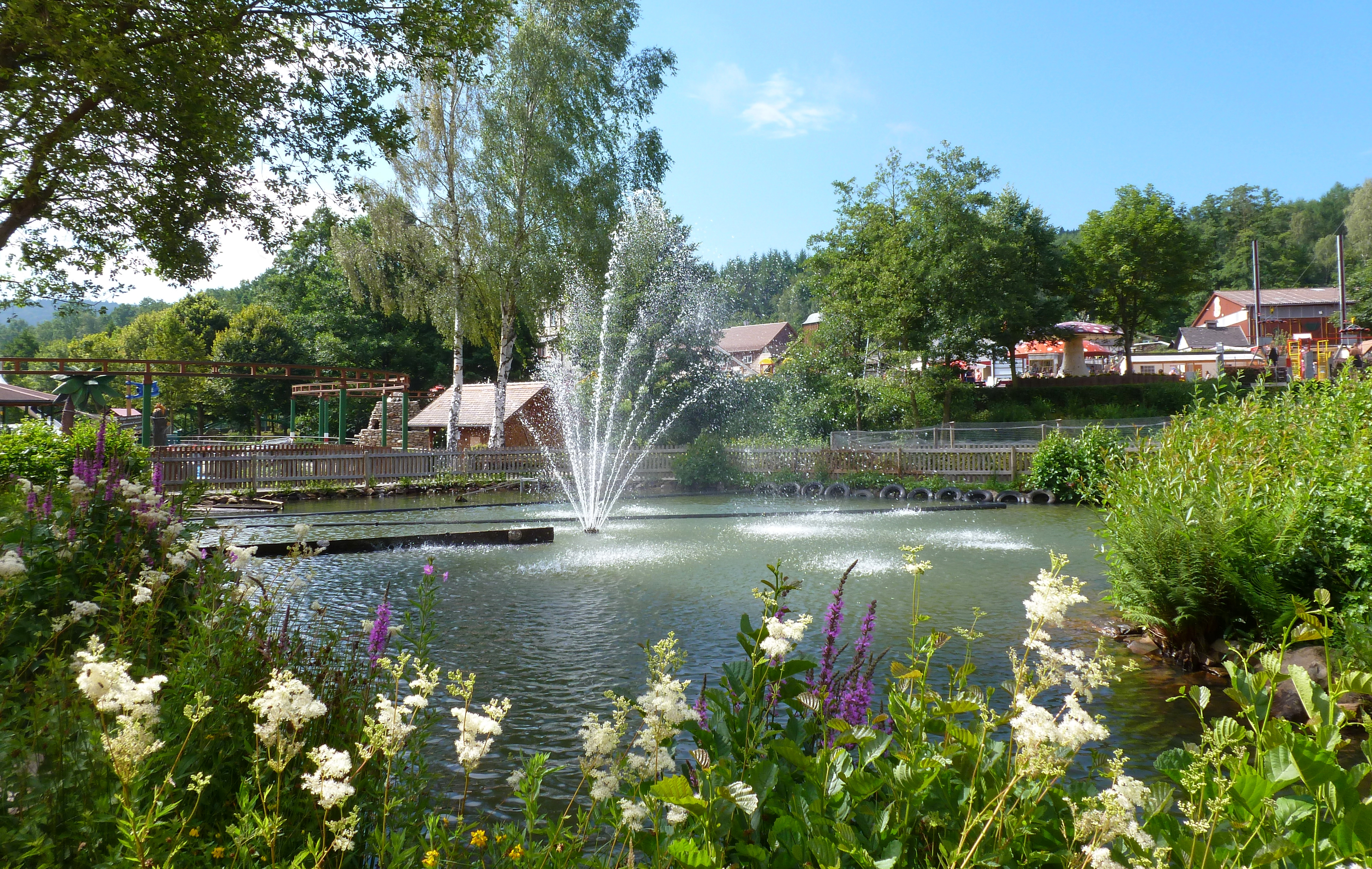 Freizeitpark Lochmühle